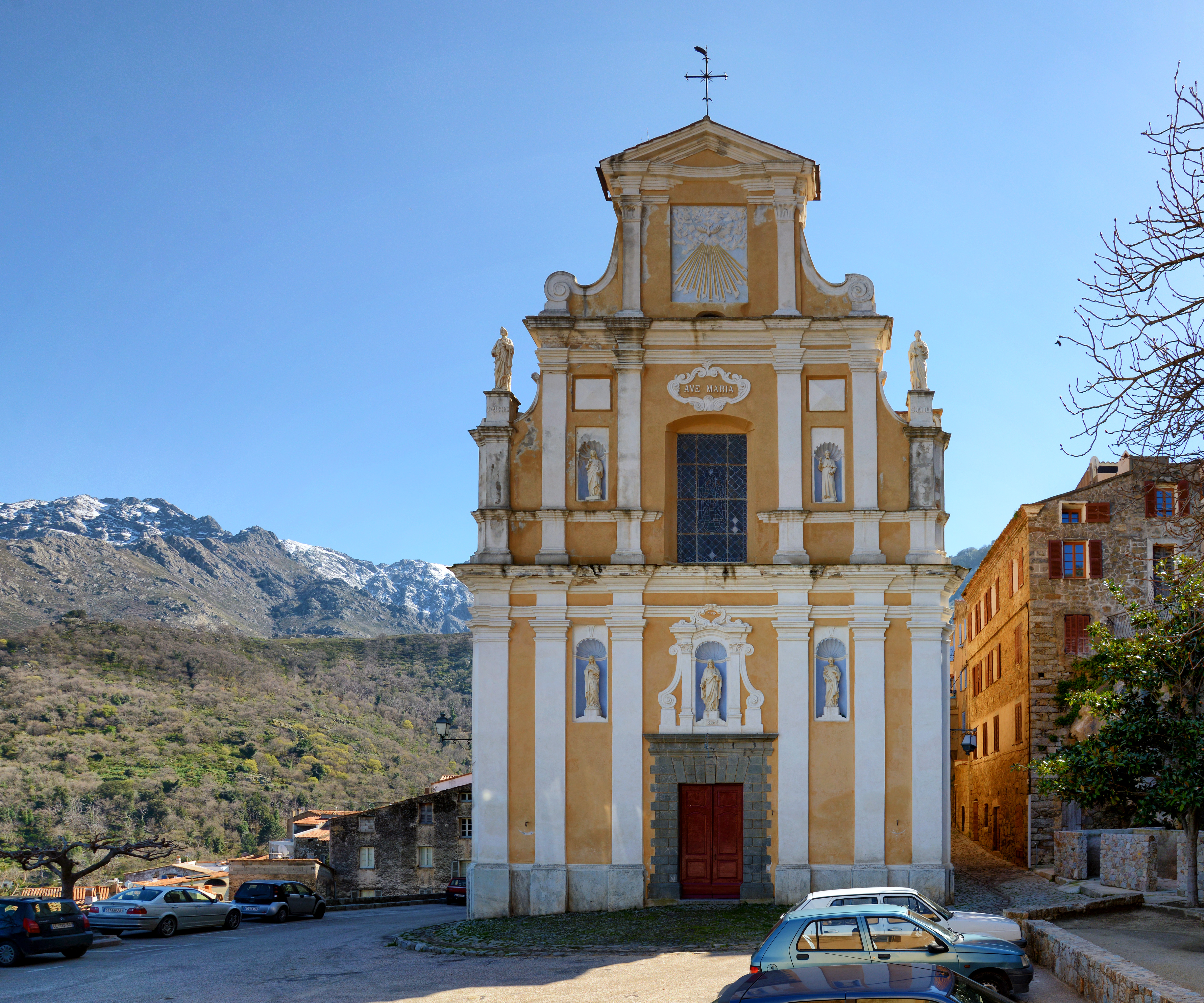 Muro, Balagne (Corse - Église de la Santissima Annunziata, de style baroque (XVIIe siècle).